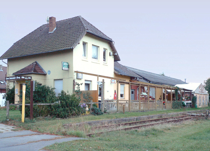 Bahnhof Parsau, Niedersachsen, Deutschland. Foto aufgenommen von Benutzer Benutzer:AxelHH, Oktober 2006